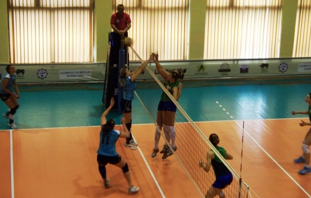 игра чемпионата Азербайджана по волейболу среди женских команд. Игтисадчи - Рабита